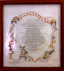 ברכת כלה